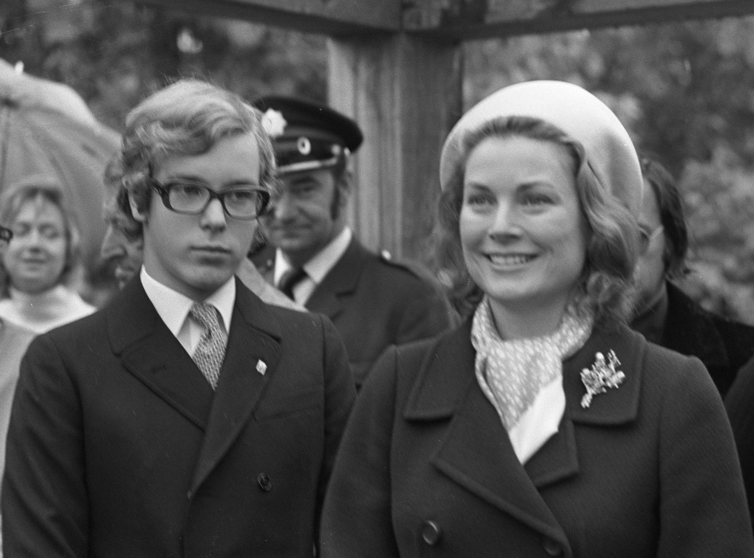 Prinses Gracia van Monaco doopt op Floriade een lelie